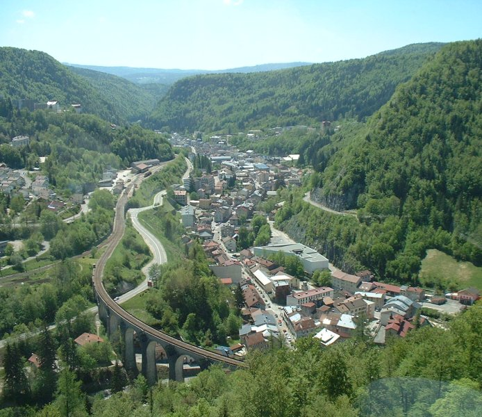 Vue de Morez depuis le viaduc des Crottes